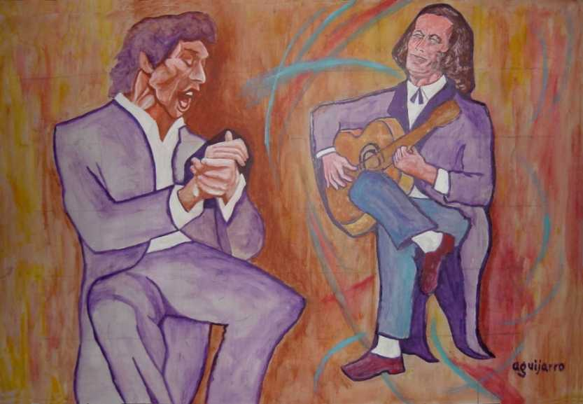 El eterno espíritu de Camarón de la Isla permanece de alguna forma unido al de su inseparable compañero flamenco Paco de Lucía, a través del arte común y de tantas concordancias compartidas. "Festival Flamenco" por Aguijarro (Antonio Guijarro Morales), pintor y cardiólogo natural de Guadix (Granada) == Título del enlace: Pinturas de Aguijarro ==